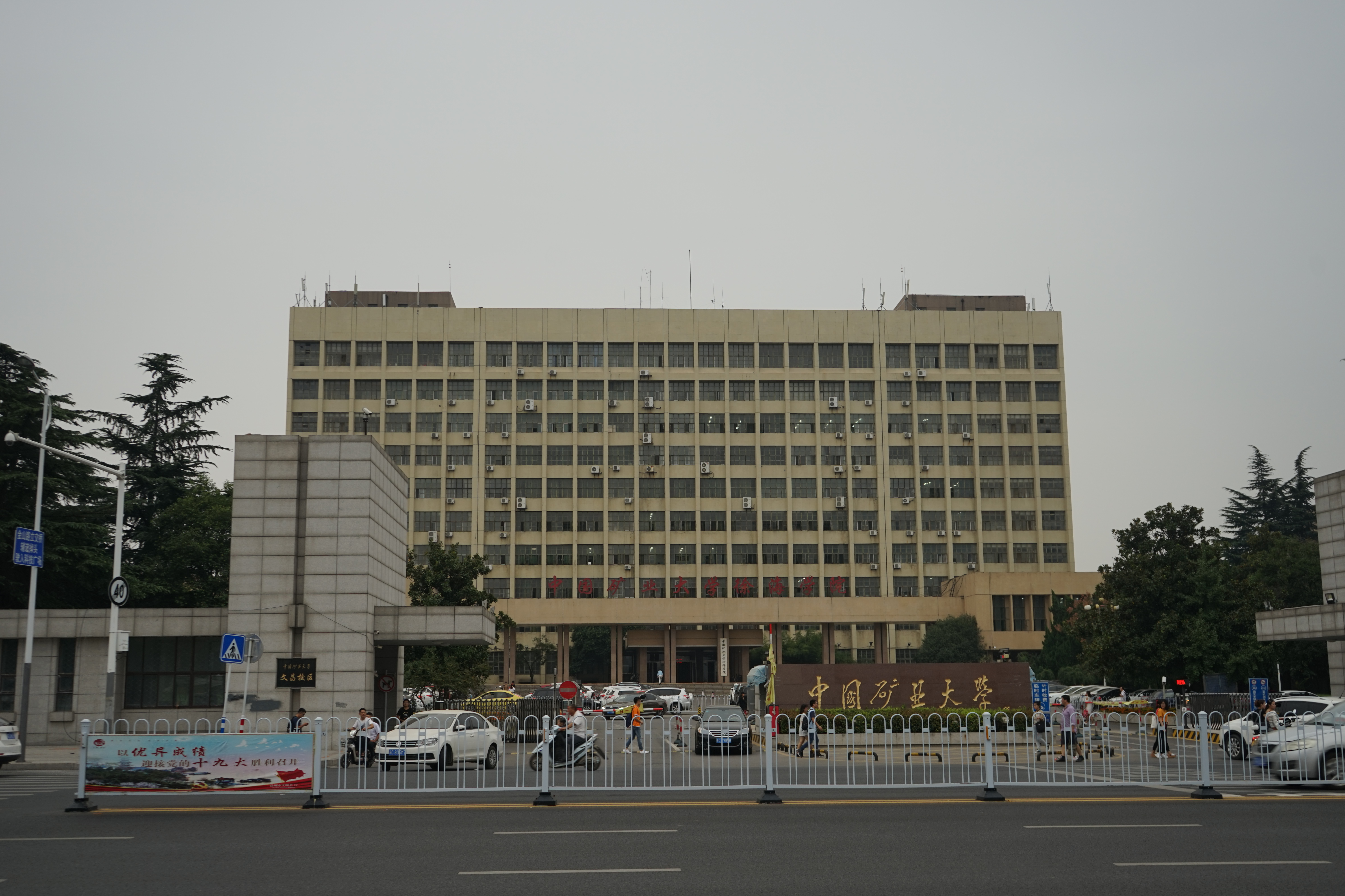 North gate of Wenchang Campus, China University of Mining and Technology, Xuzhou